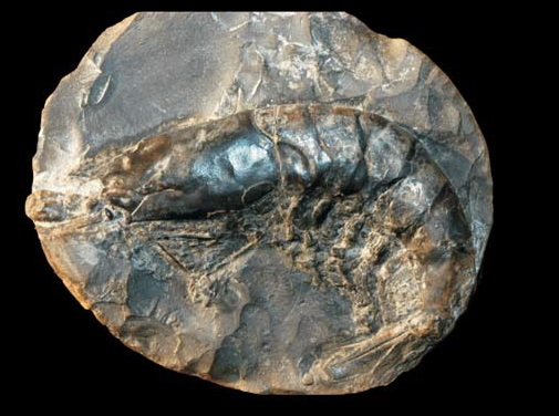 Types of preservation for the La Voulte arthropods. A. 3D−preserved shrimp in sideritic nodule (Archeosolenocera straeleni Carriol and Riou, 1991, MNHN R61840), lateral view, note the stalked eye and the pleopods.